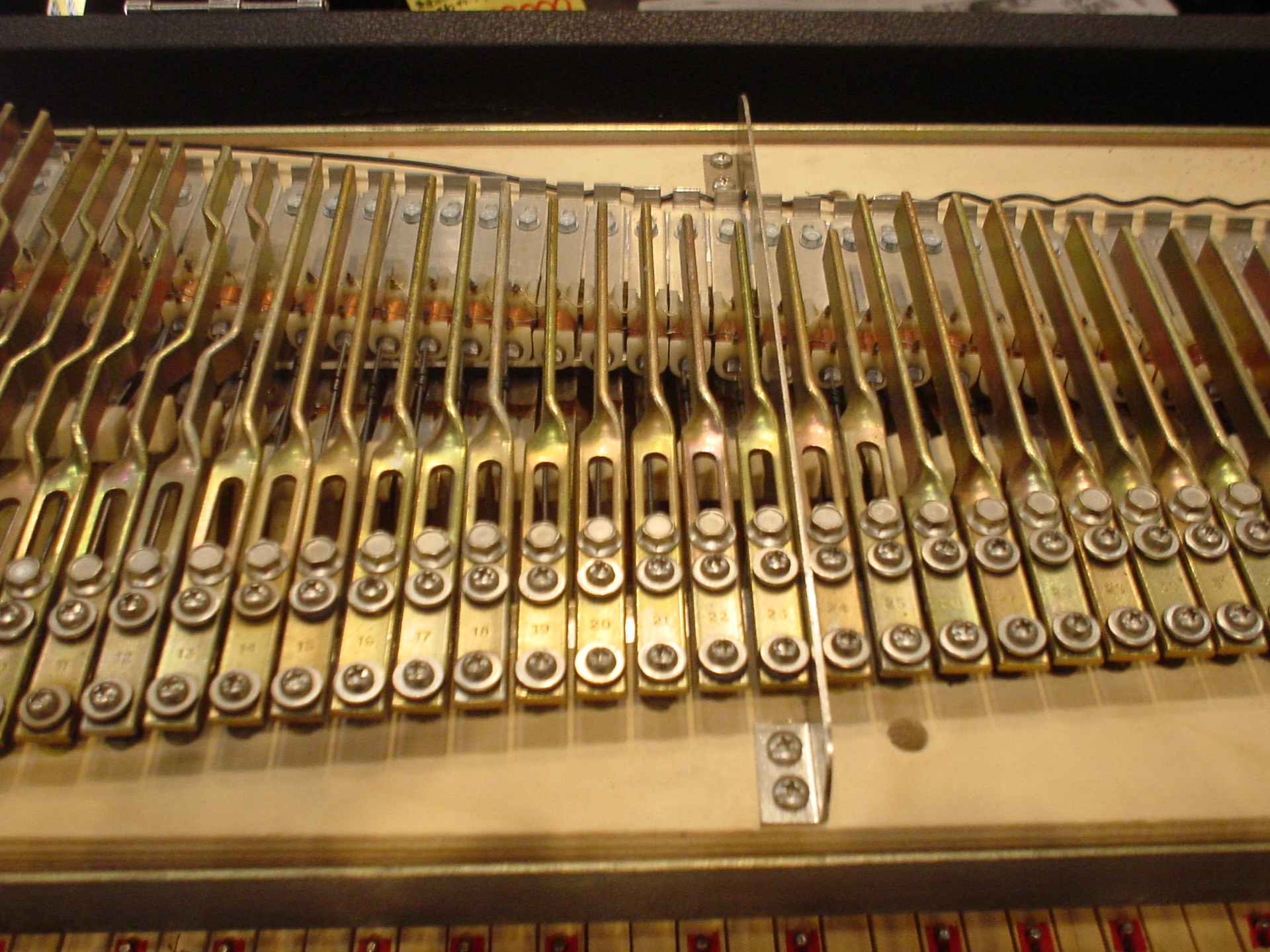 Fender Rhodes (Inside)